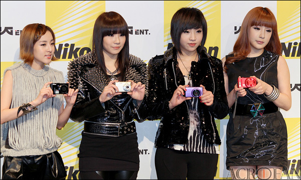 니콘 & YG 'A Shot A Day' 캠페인 선포식